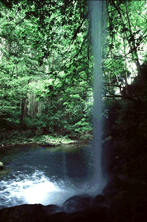 Imatge de camós